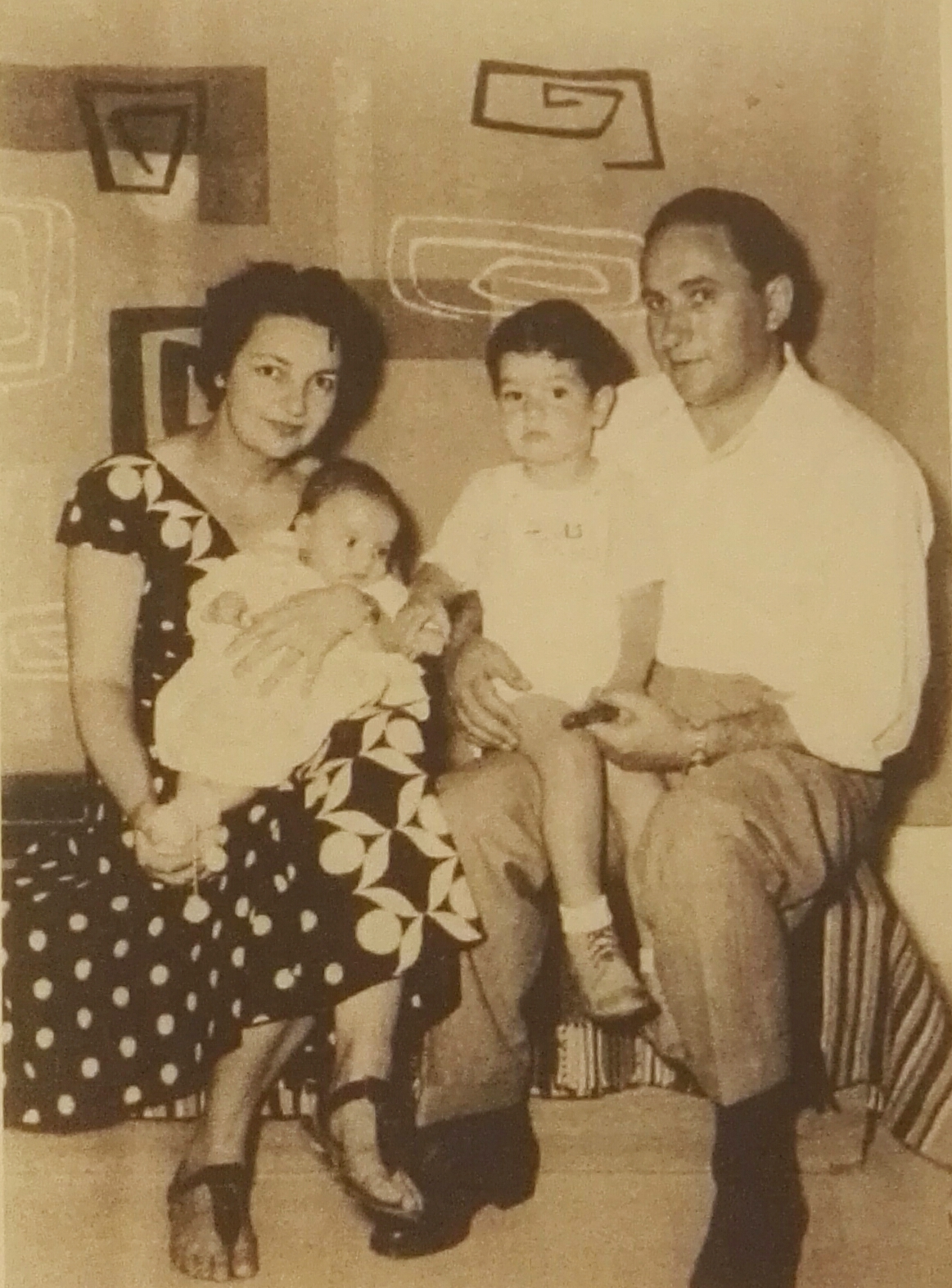 משפחת ברעם-לוטן בצילום משפחתי. מימין לשמאל: אדריכל ישראל לוטן,רמי לוטן, טליה לוטן ובלה ברעם-לוטן.